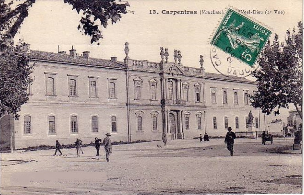 Hôtel-Dieu Carpentras début XXe s